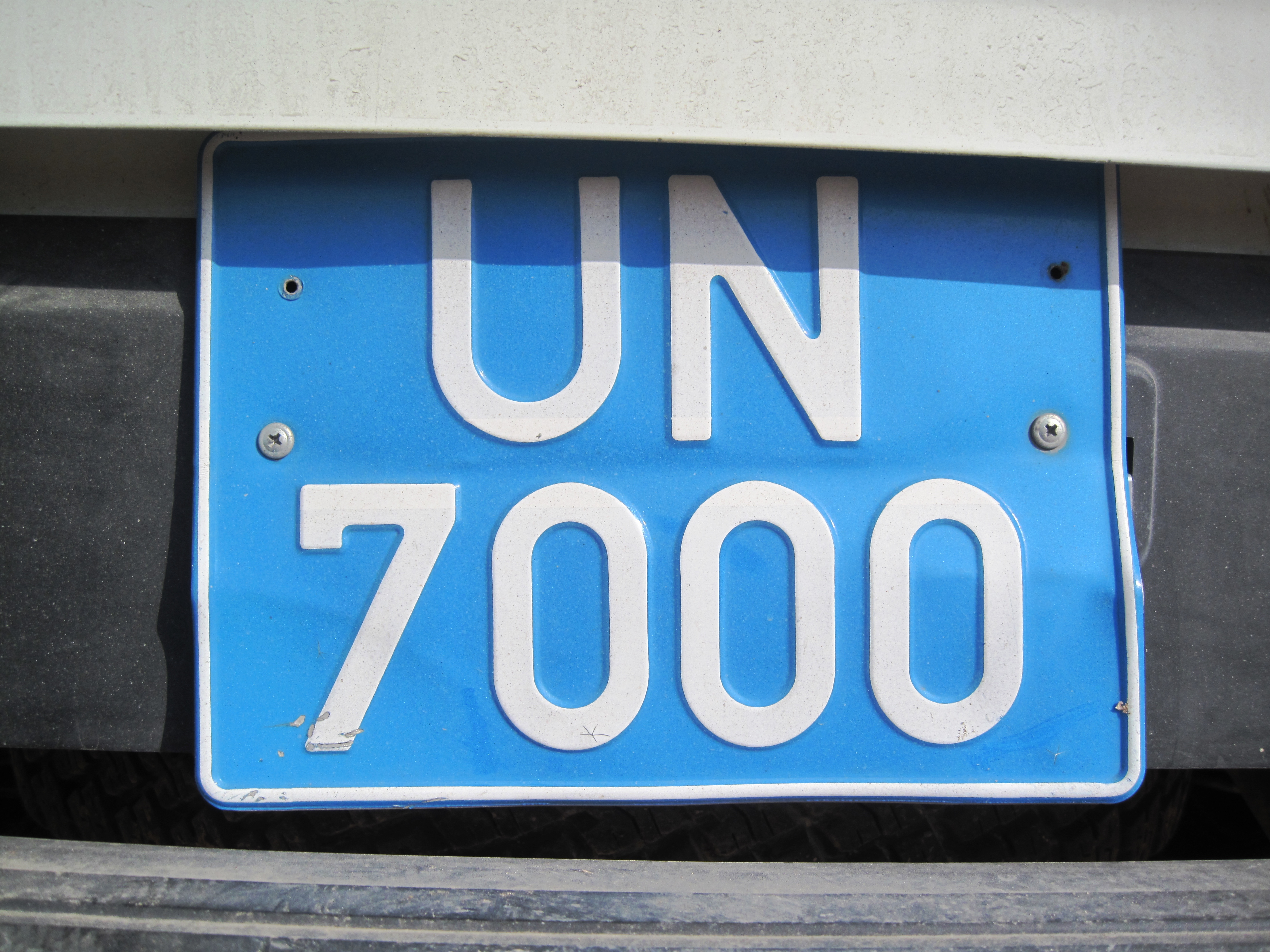 Dutchbat licenceplate UN Cyprus